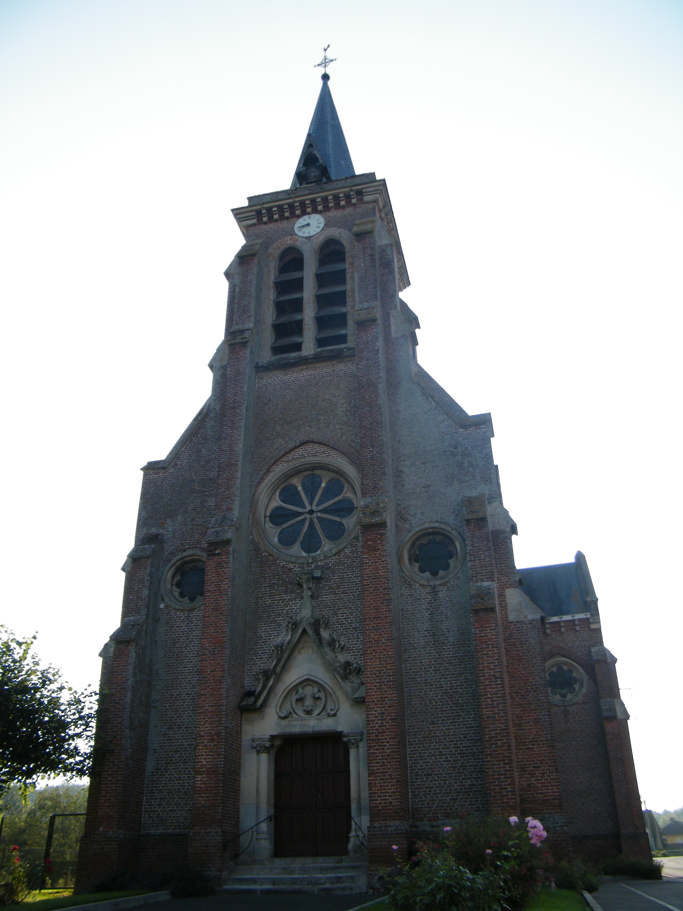 église.